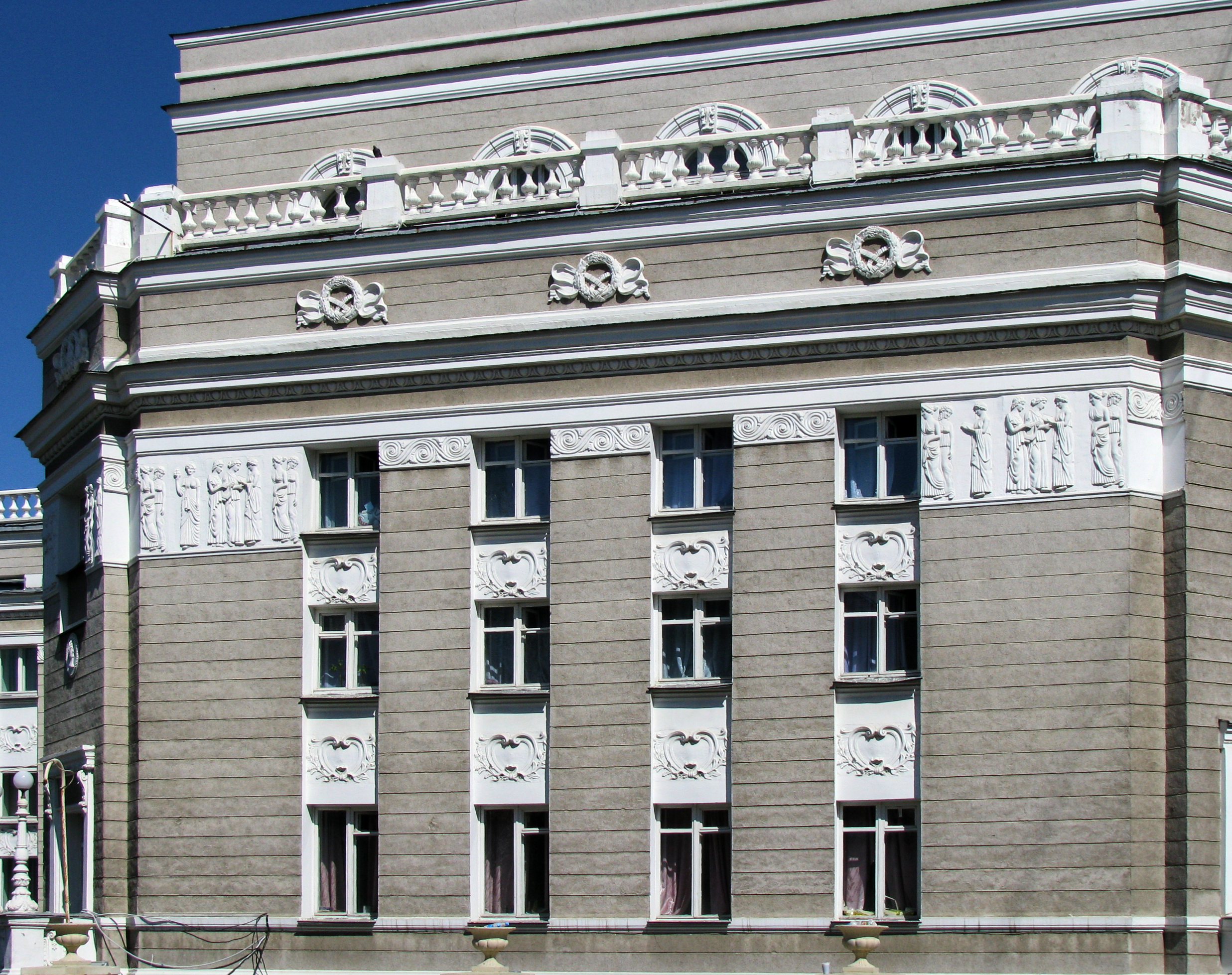 Барельефы на здании Екатеринбугского театра оперы и балета